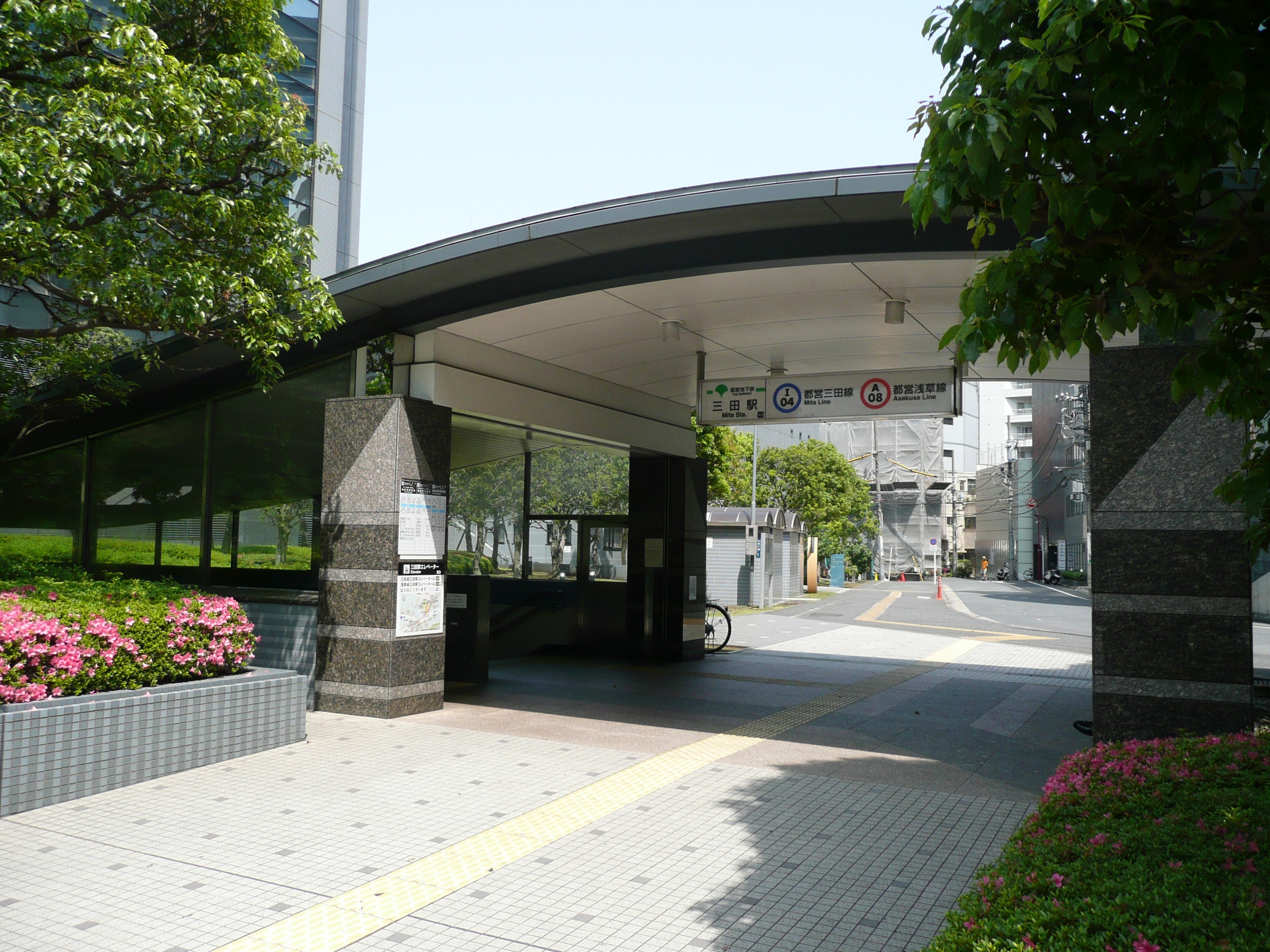 三田駅A9出入口